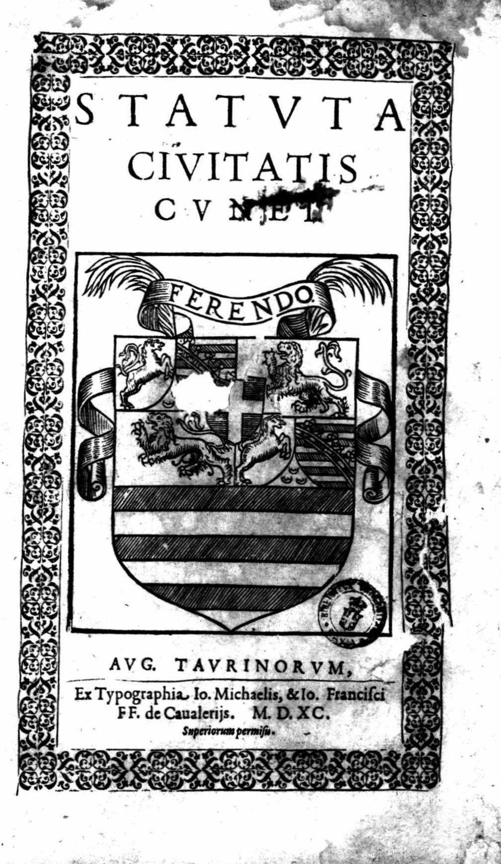 Frontespizio